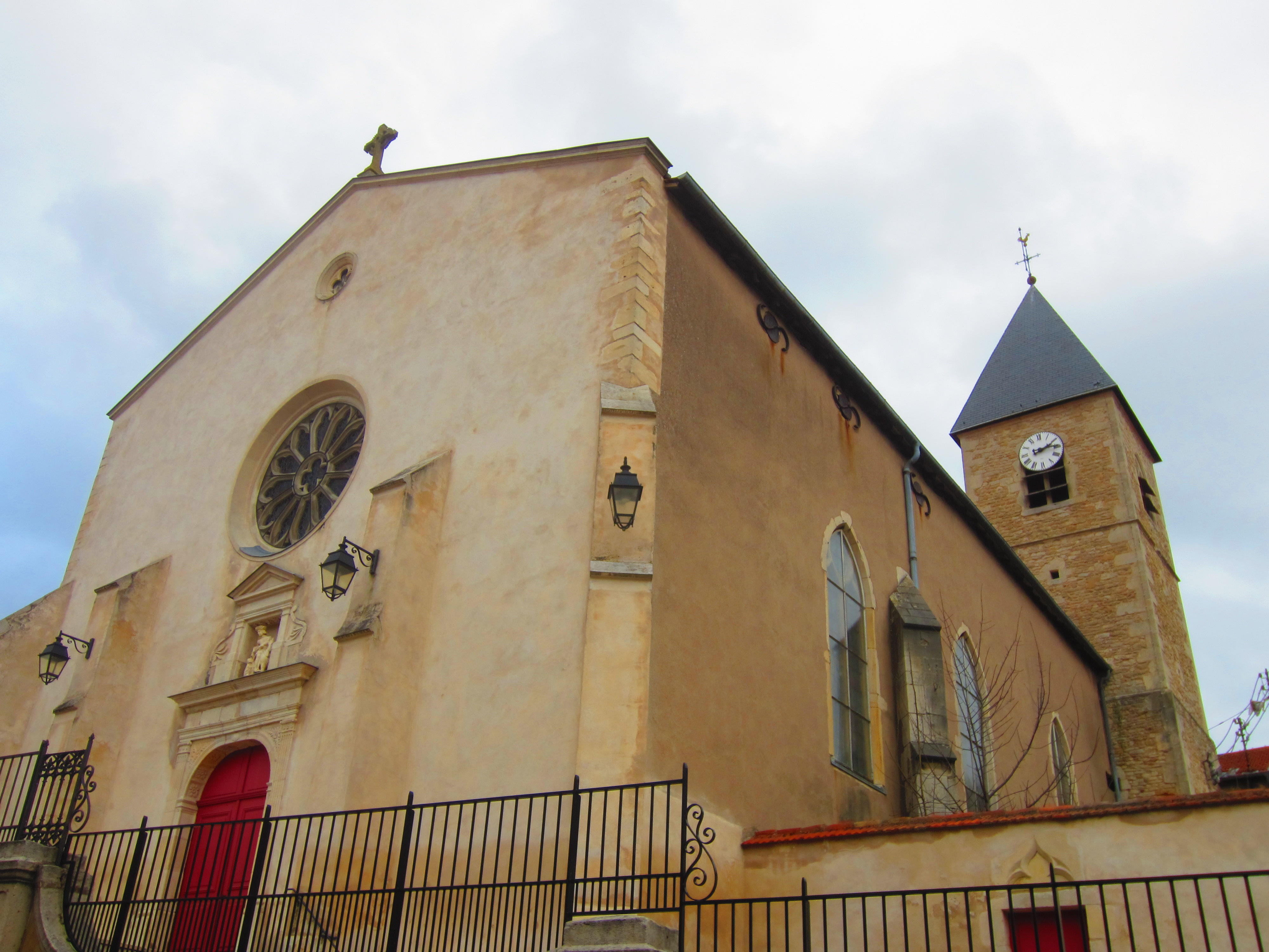 Malzeville eglise st martin